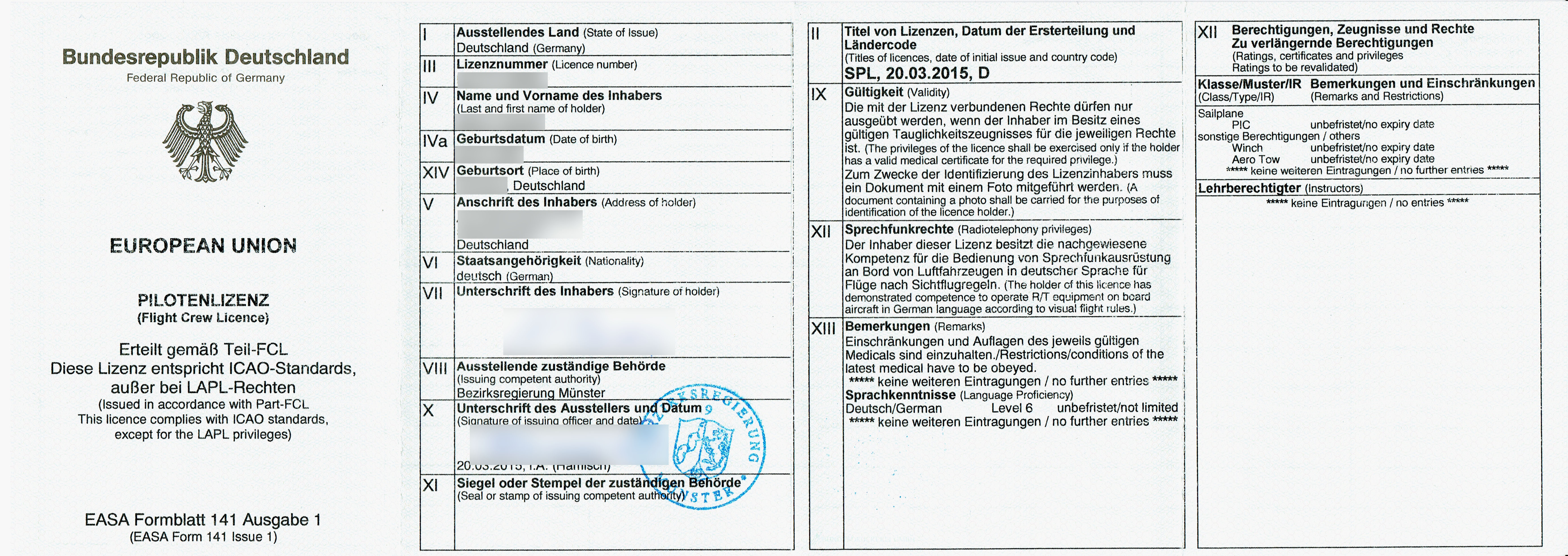 Die Vorderseite einer nach EASA-FCL ausgestellten SPL Lizenz